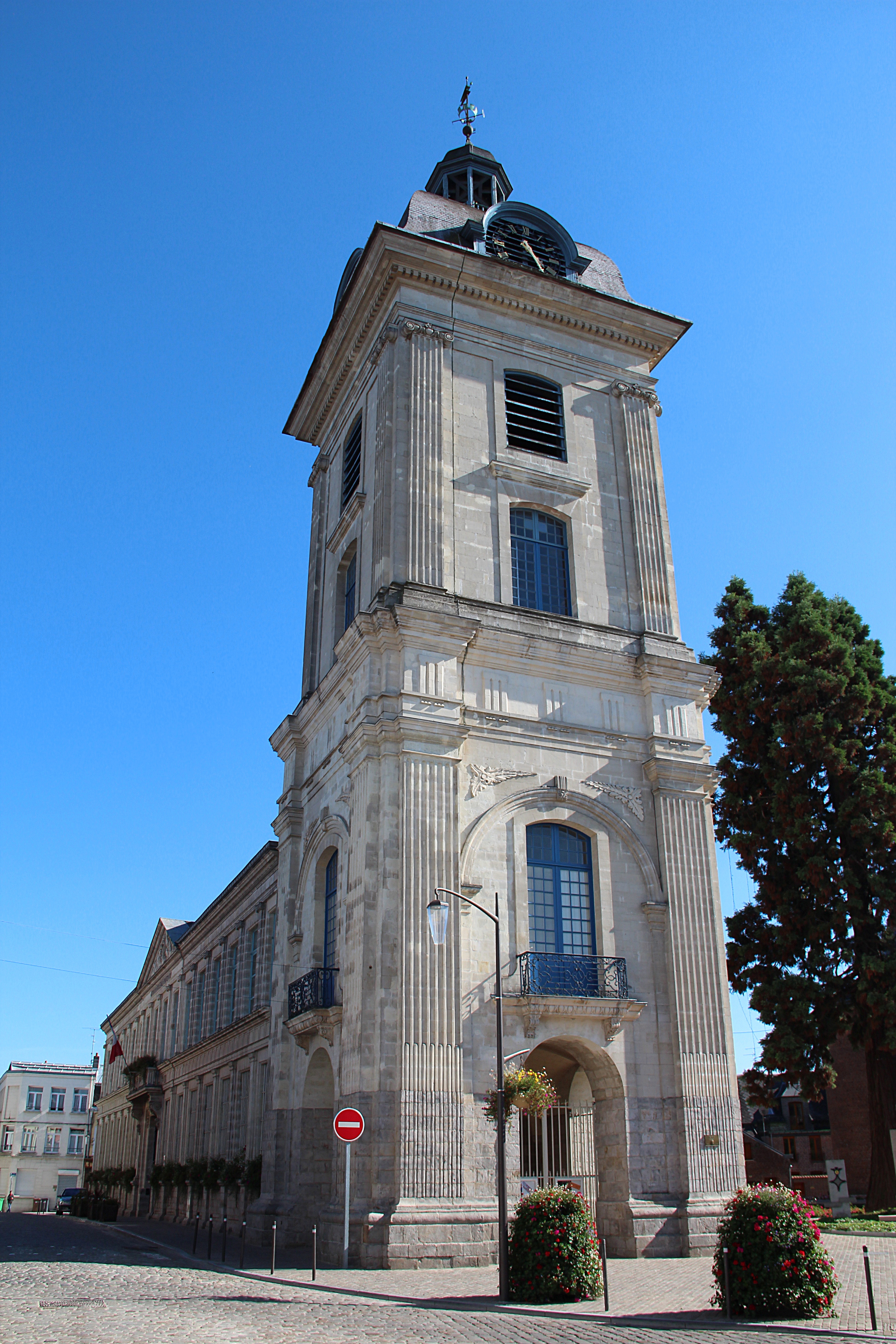 Hôtel de ville de Le Quesnoy (Nord, France).